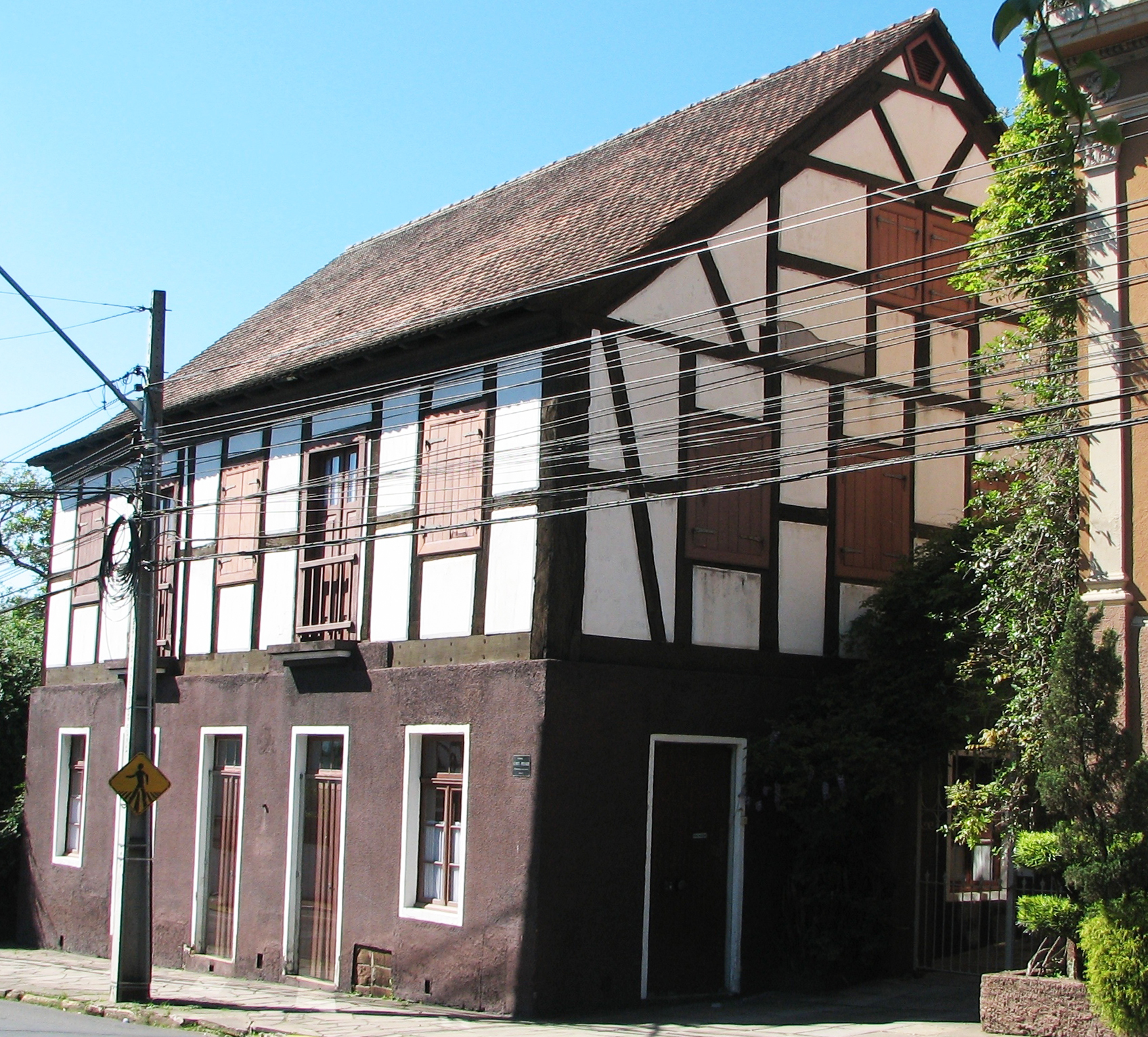 Fachada do Museu Comunitário Casa Schmitt-Presser, edifício histórico situado em Novo Hamburgo, Rio Grande do Sul - Brasil.